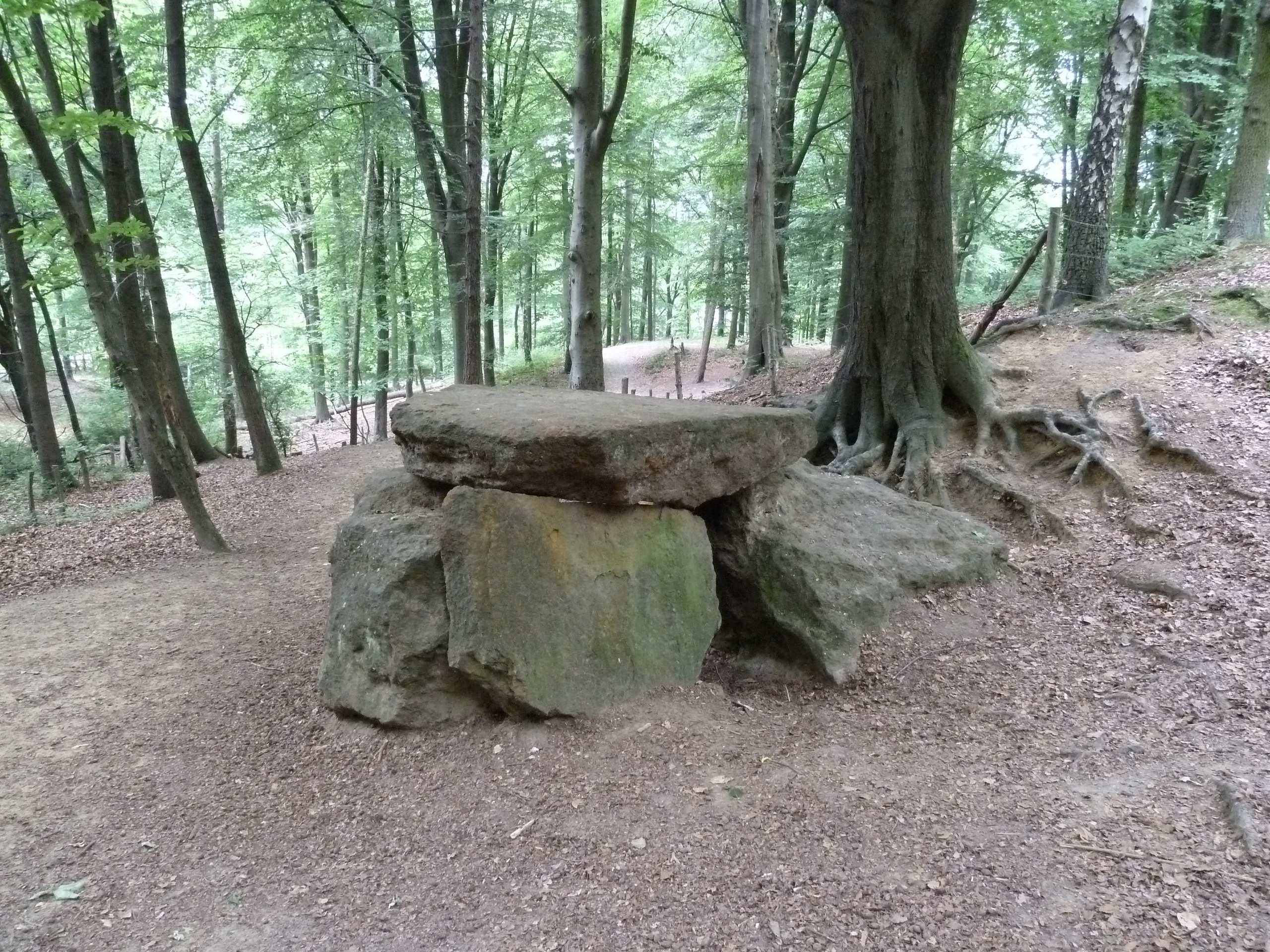 Peetje en Meetje, Kluisbergen, België